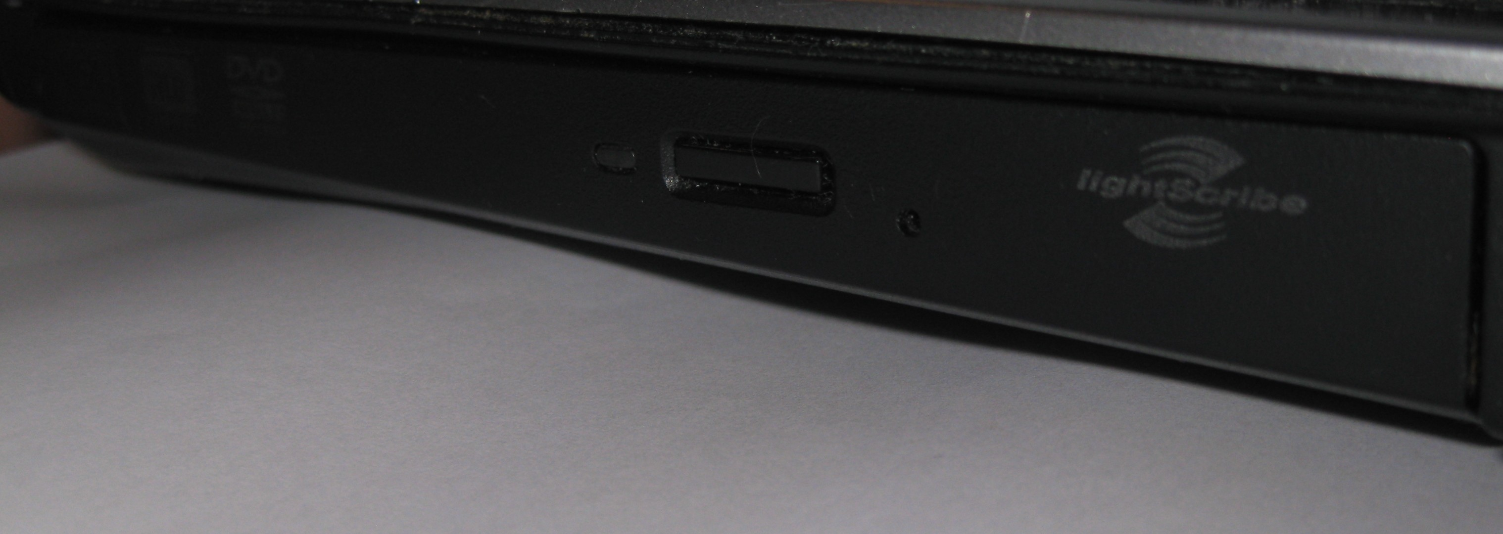 LightScribe DVD kirjutaja